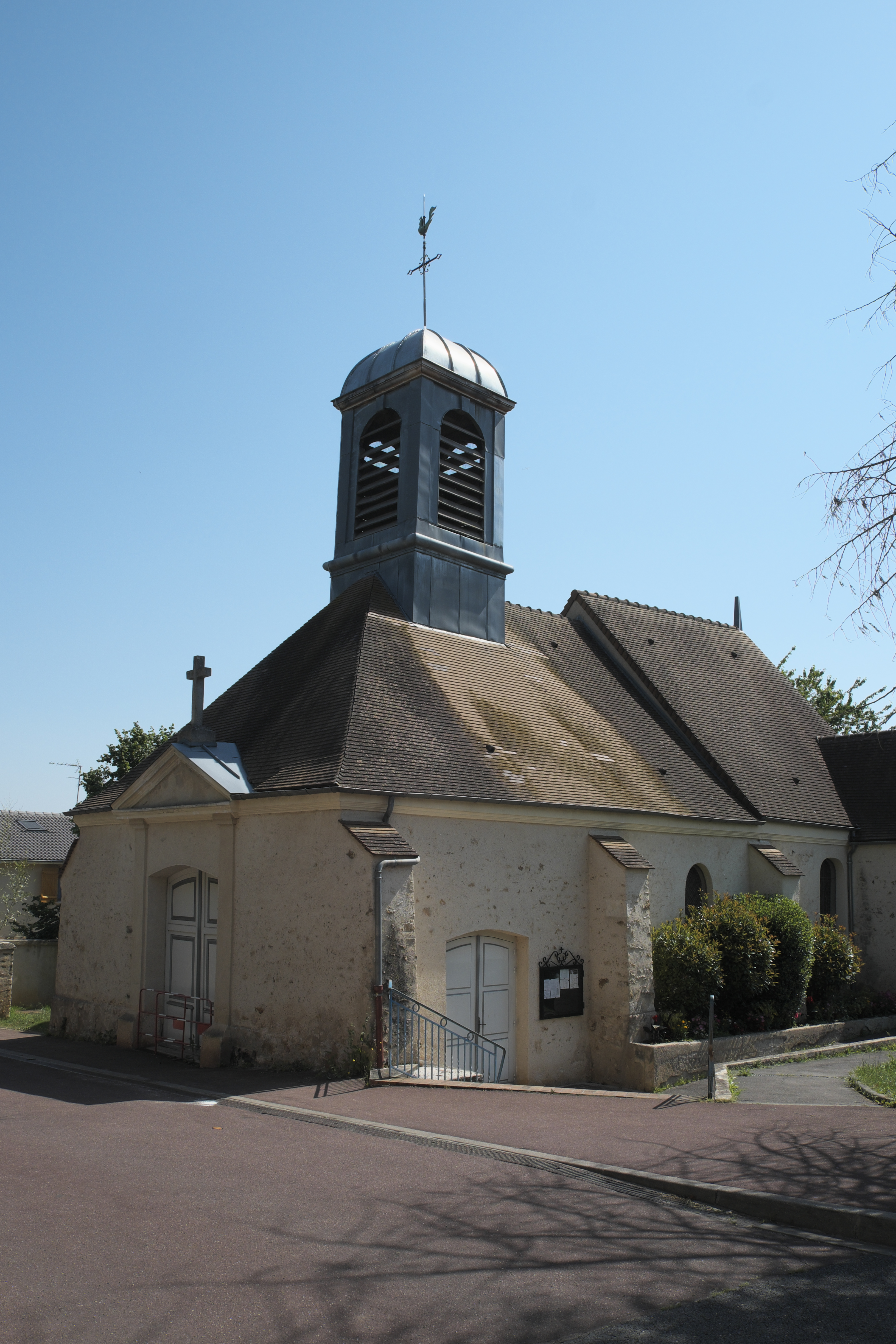 Katholische Pfarrkirche Sainte-Croix in Quincy-sous-Sénart im Département Essonne (Region Île-de-France/Frankreich)